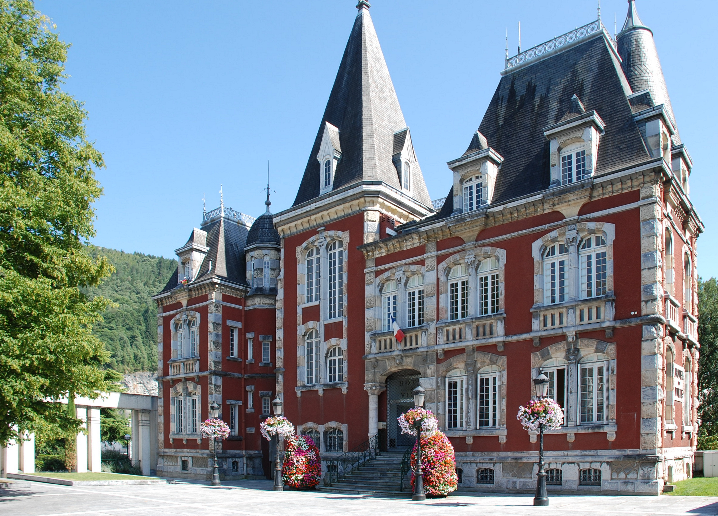 Mairie de Lourdes, façade nord, entrée